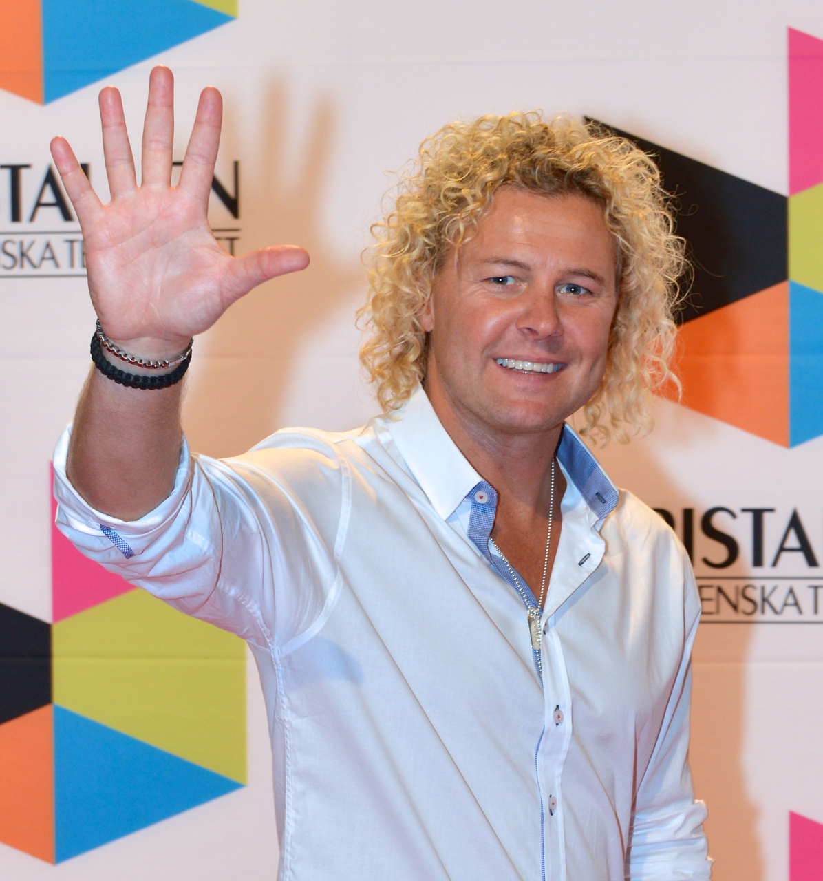 Morgan "Mojje" Johansson på Kristallen-galan den 30 augusti 2013.